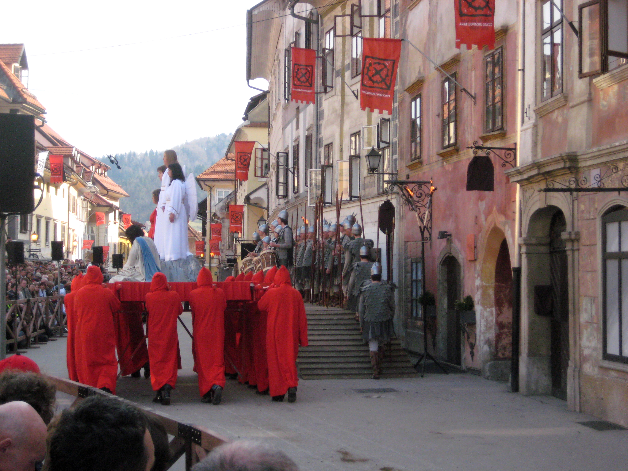 Škofjeloški pasijon (Processio Locopolitana), izvedba 2009 v Škofji Loki